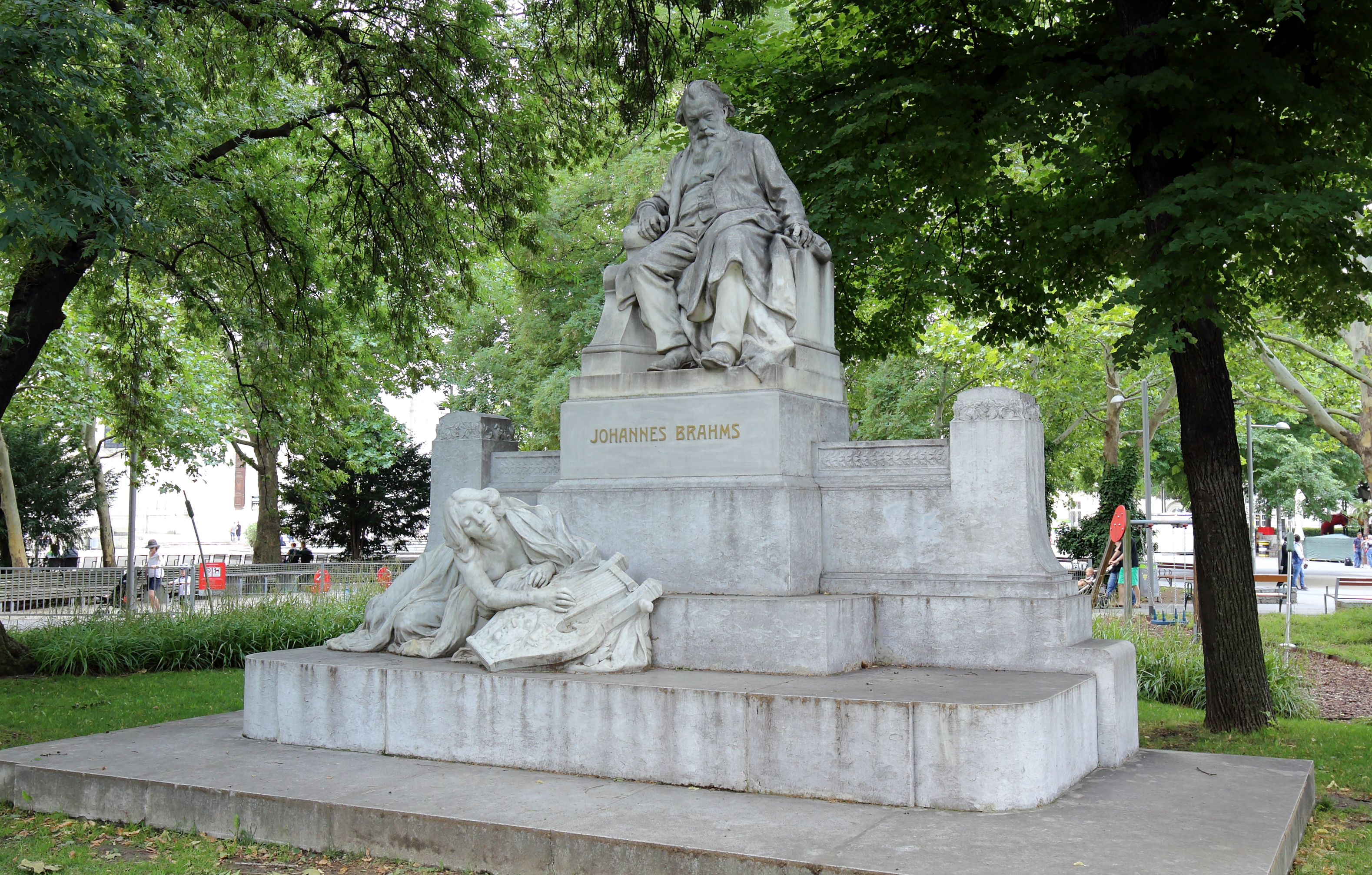 Das Johannes-Brahms-Denkmal am Karlsplatz (Resselpark) in der österreichischen Bundeshauptstadt Wien. Das Denkmal ist ein Werk von Rudolf Weyr und wurde am 7. Mai 1908 am Karlsplatz enthüllt.